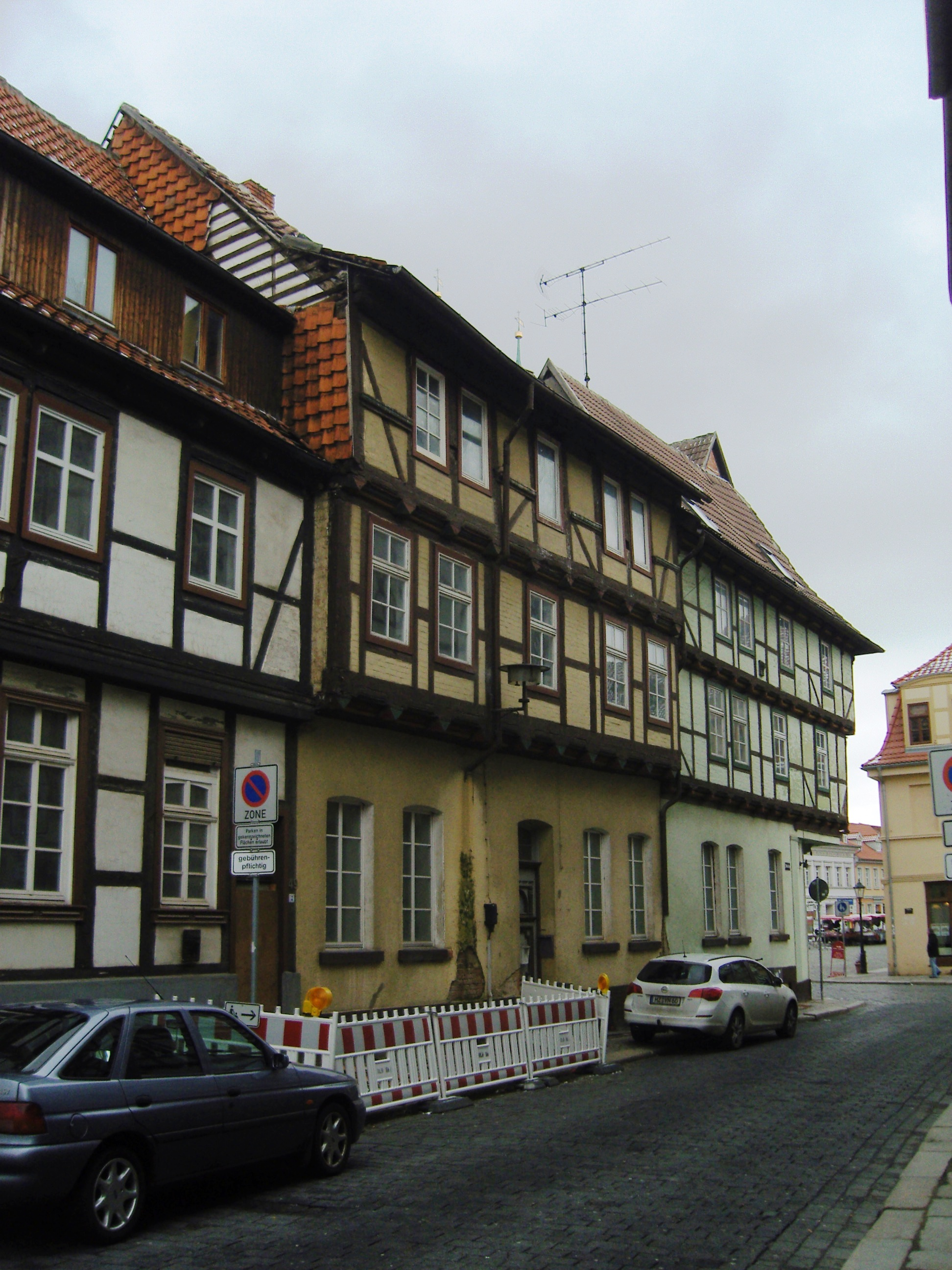 Denkmalgeschütztes Wohnhaus Steinweg 9 in Quedlinburg, gesehen von der Weberstraße